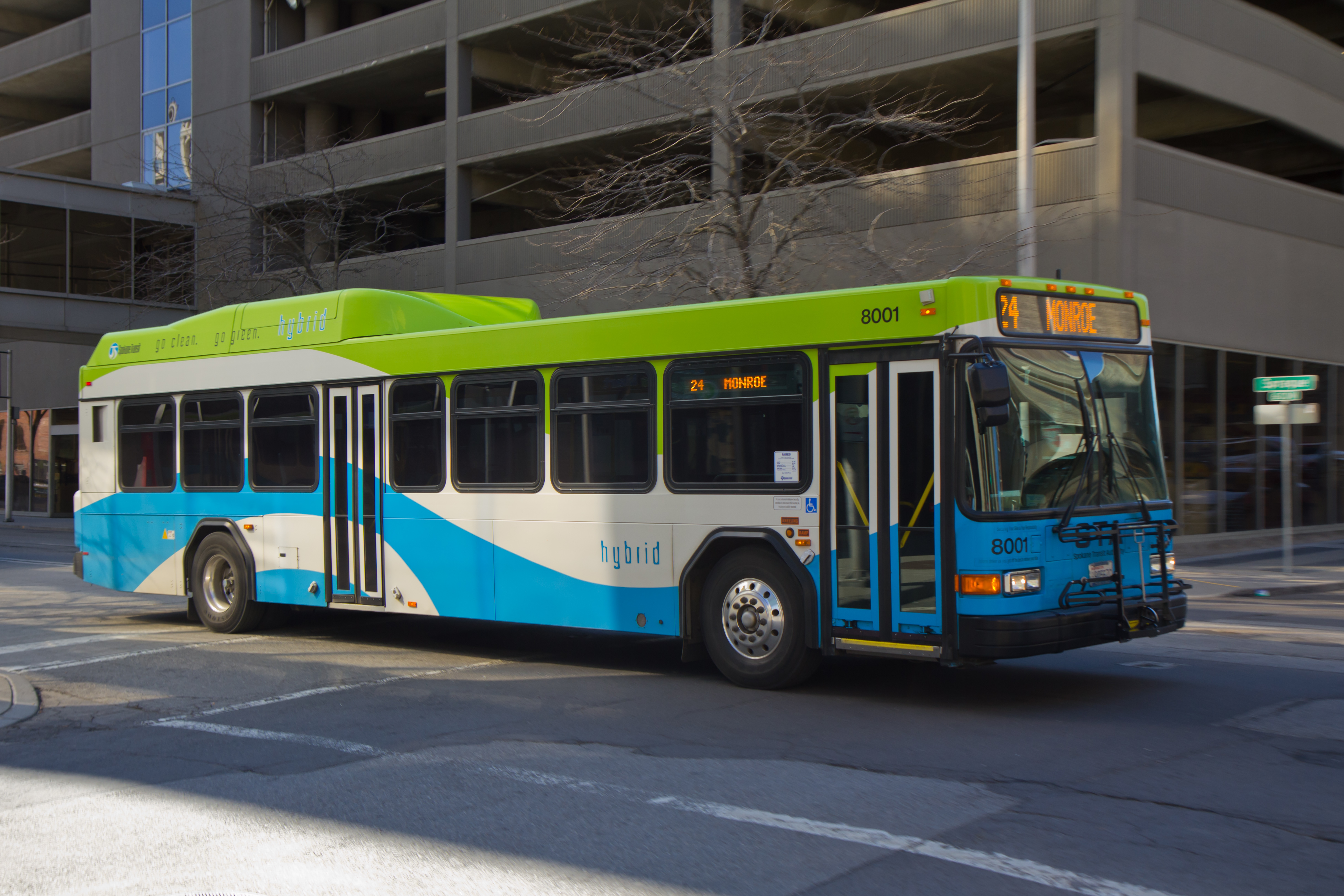 2008 Gillig Low Floor HEV 40'